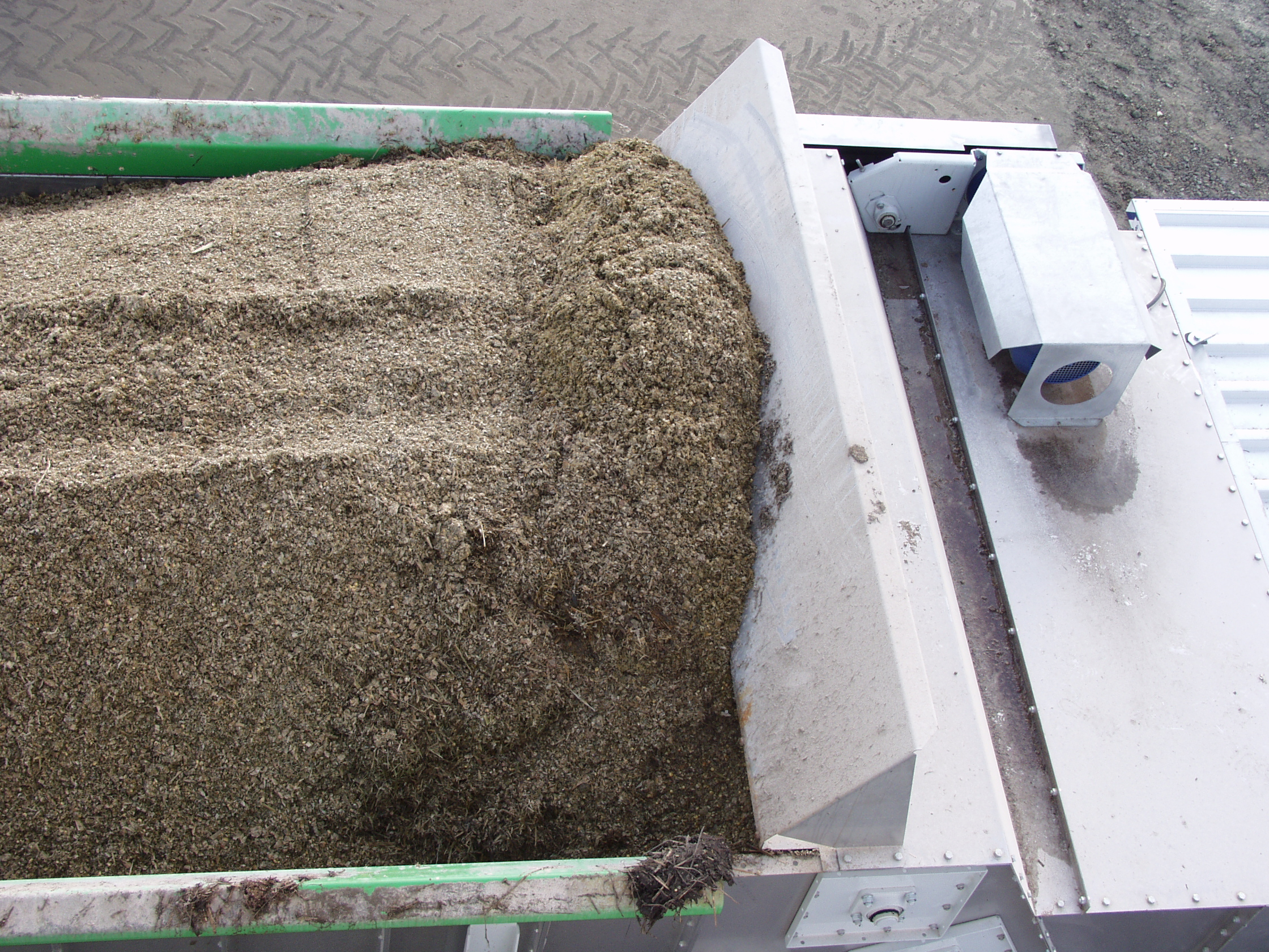 Maissilage, in Deutschland das am häufigsten eingesetzte Substrat für Biogas, hier im Substratdosierer (Zuführeinrichtung) zum Fermenter einer Biogasanlage in Bayern.